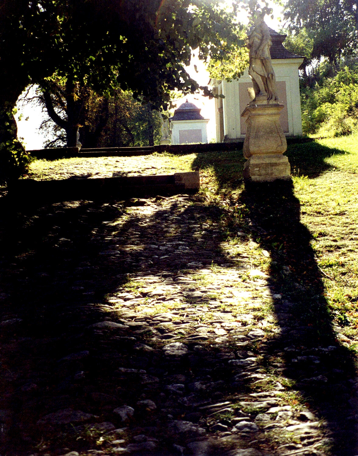 Stift Heiligenkreuzer Kreuzweg